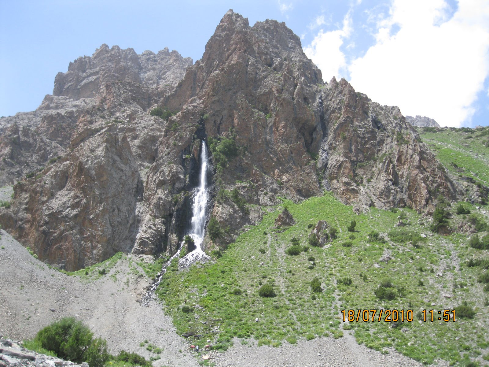 Тоҷикӣ: Муллошаршара, шаршара дар Каздон